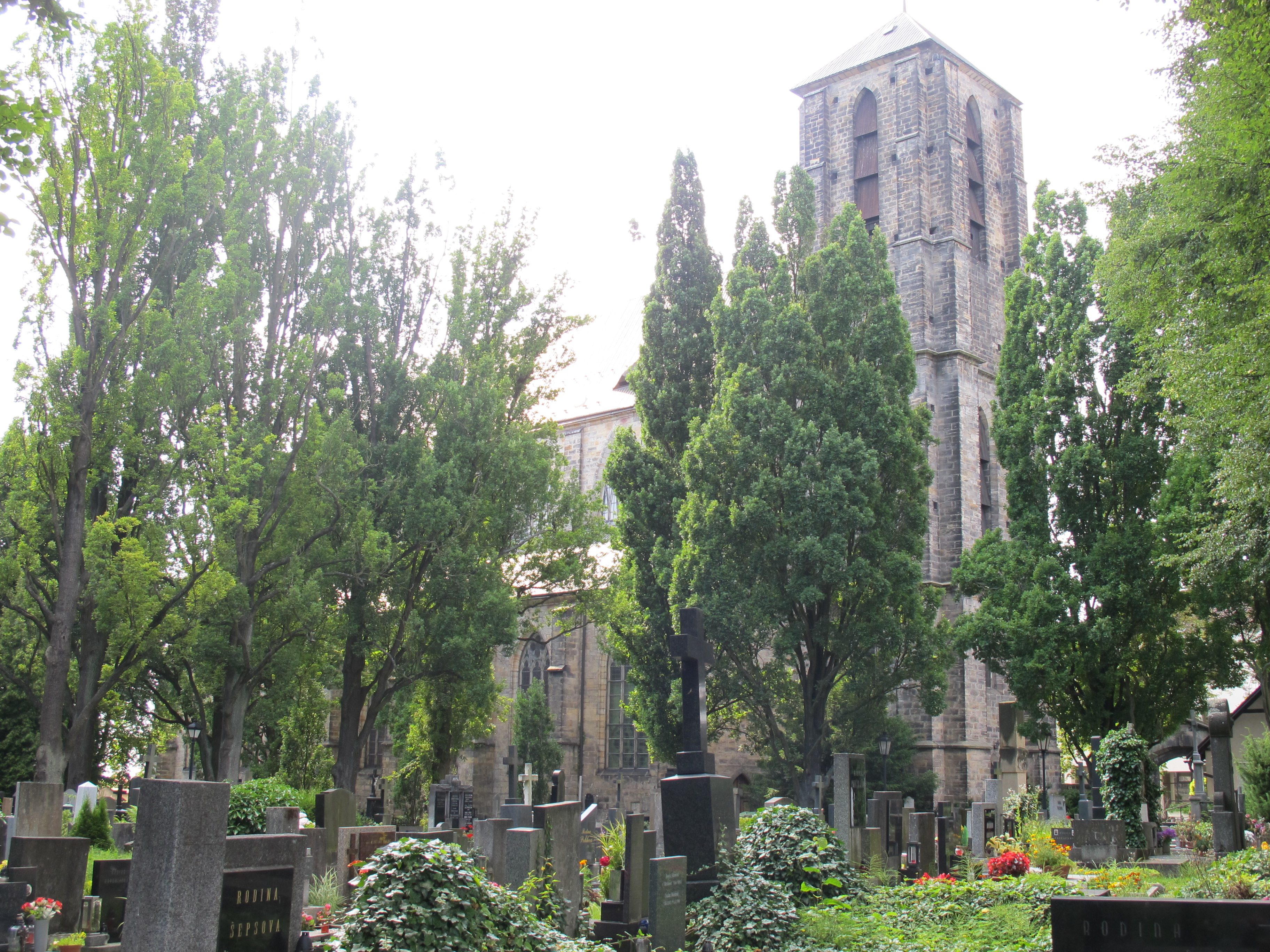 Hřbitov v Turnově